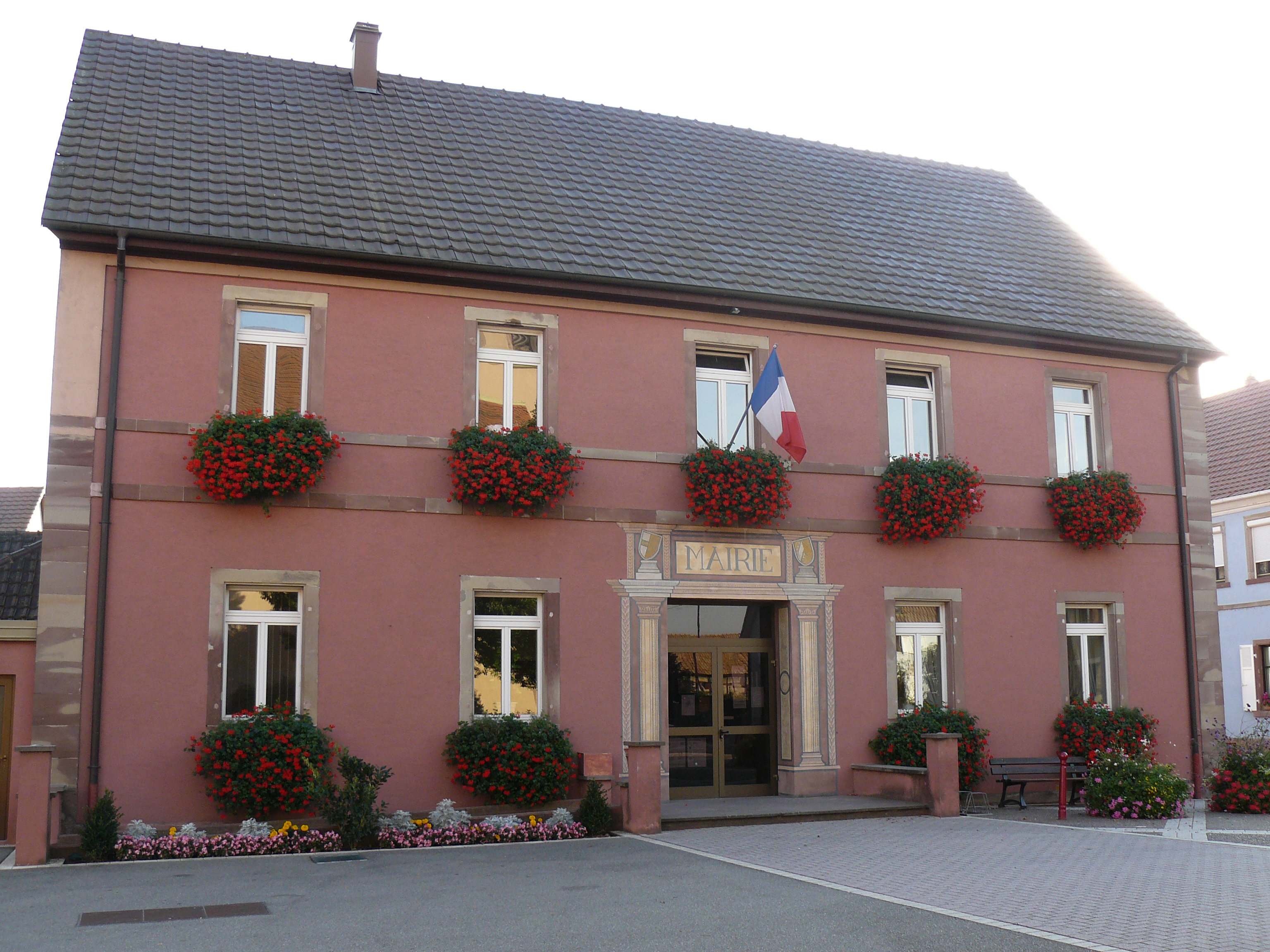 Mairie (1862) d'Artolsheim (Bas-Rhin)